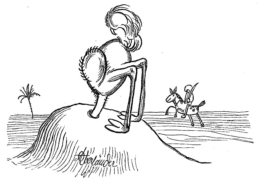 Lustige Naturgeschichte oder Zoologia comica. München: Braun & Schneider